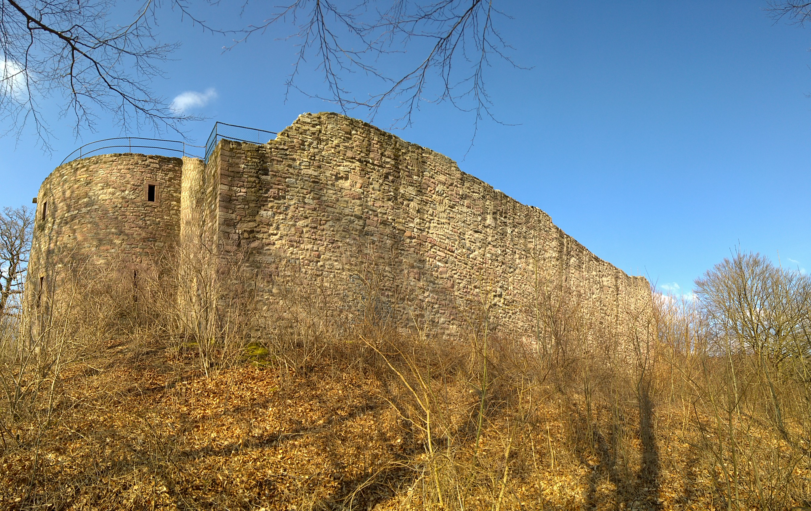 Burgruine Steckelberg bei Ramholz, Blick von Südwesten